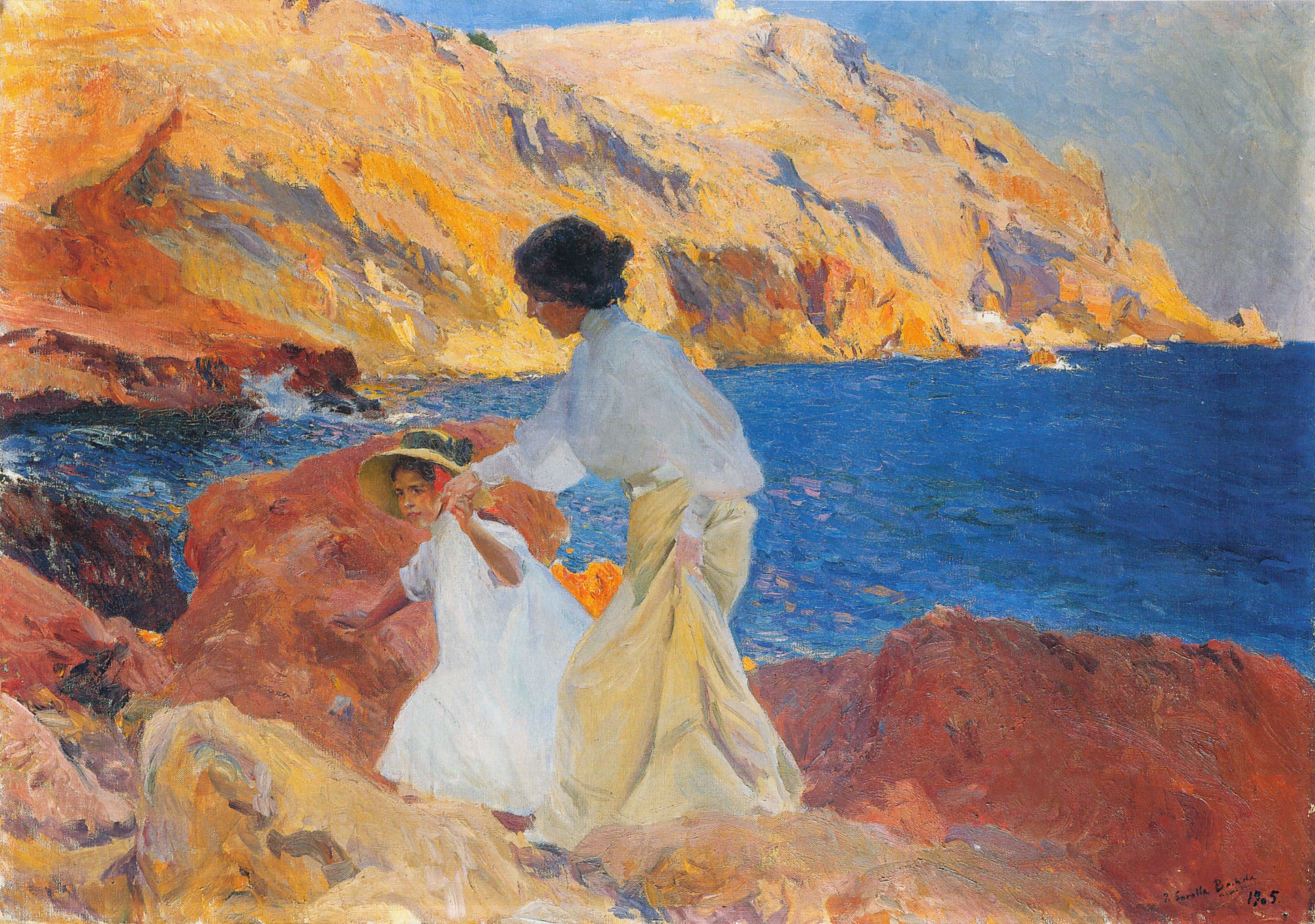 Clotilde y Elena en las Rocas, Jávea — by Joaquín Sorolla. oil on canvas; 90 x 125 cm. at Xàbia ( Jávea), Valencia, Spain.